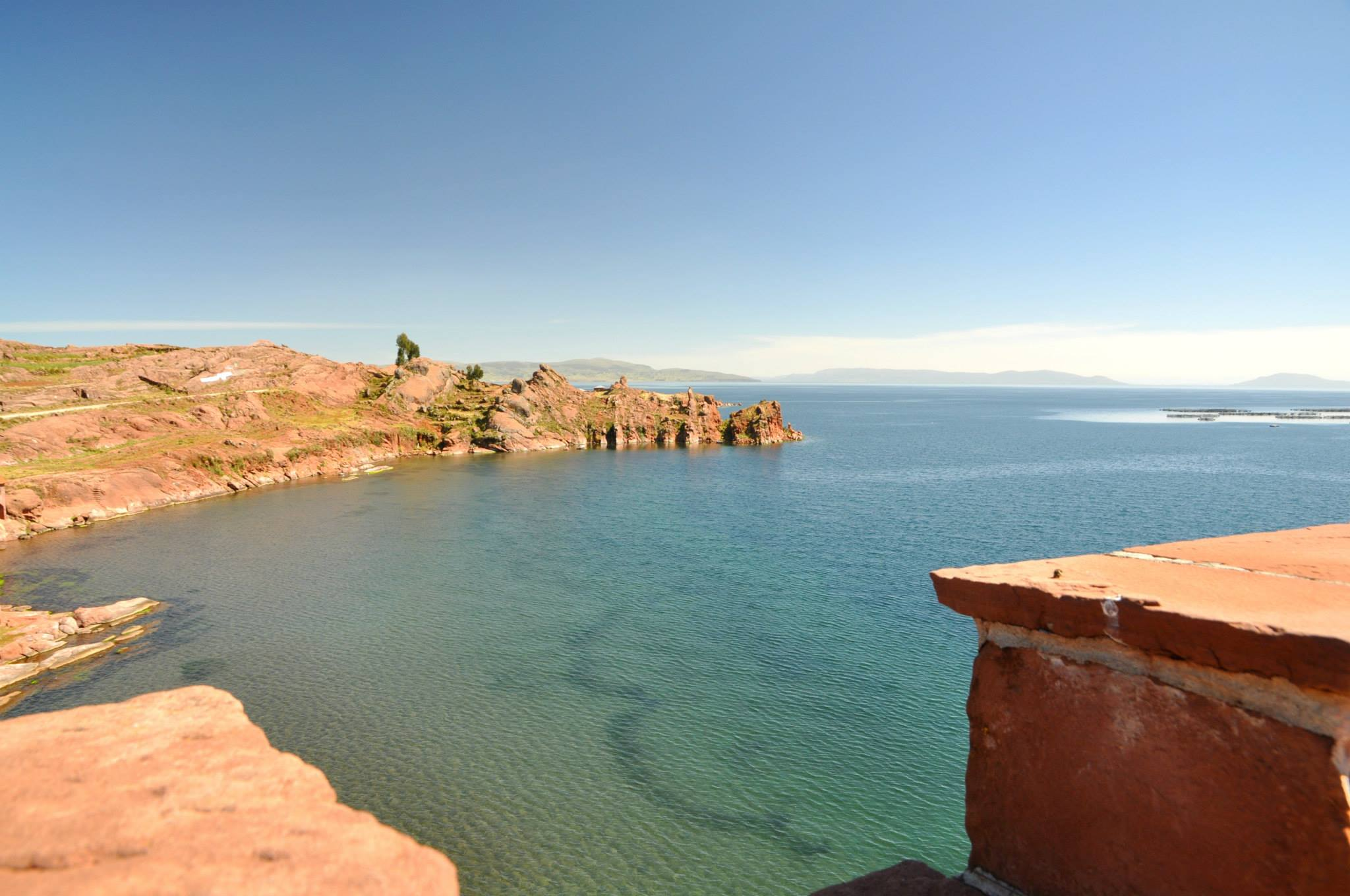 Platería Puno Peru